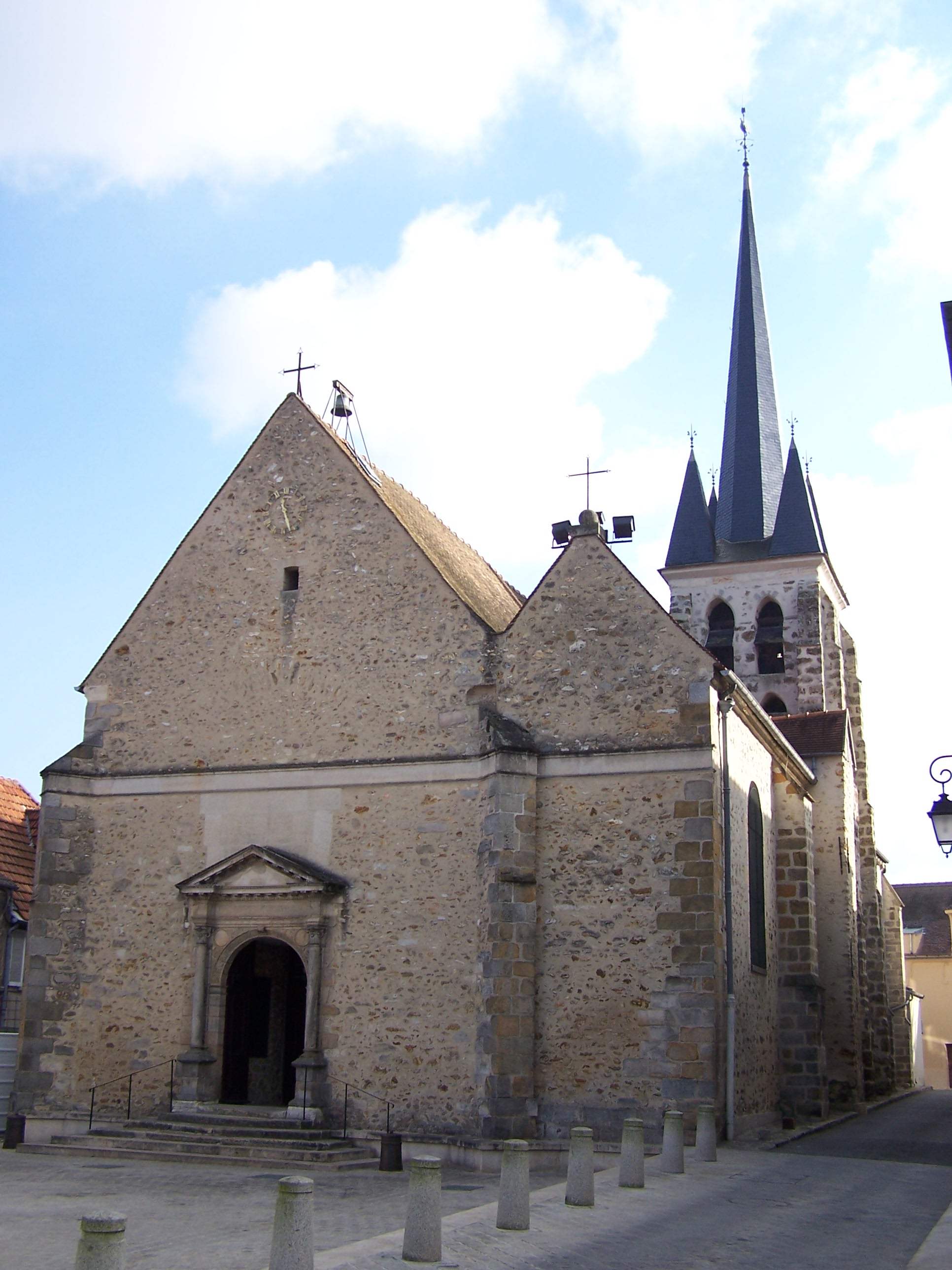 Église Saint-Martin de Jouy-en-Josas (Yvelines, France)